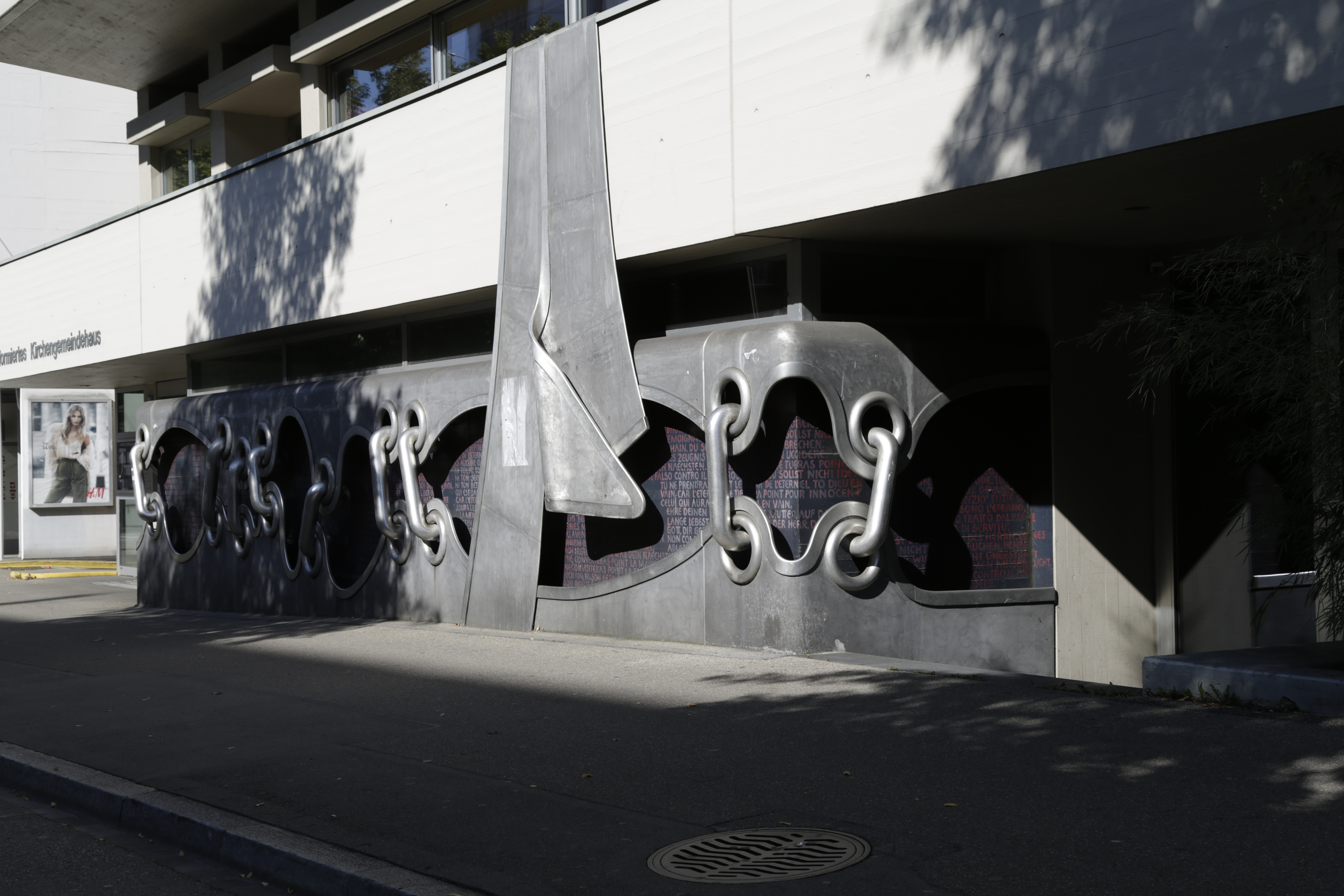 An der Aussenfassade des Kirchgemeindehauses der reformierten Kirchgemeinde Aussersihl am Stauffacher in Zürich, befindet sich das Kunstwerk "die zehn Gebote". Dieses Kunstwerk aus Aluminium und Malerei wurde zwischen 1974 und 1975 von Peter Travaglini geschaffen